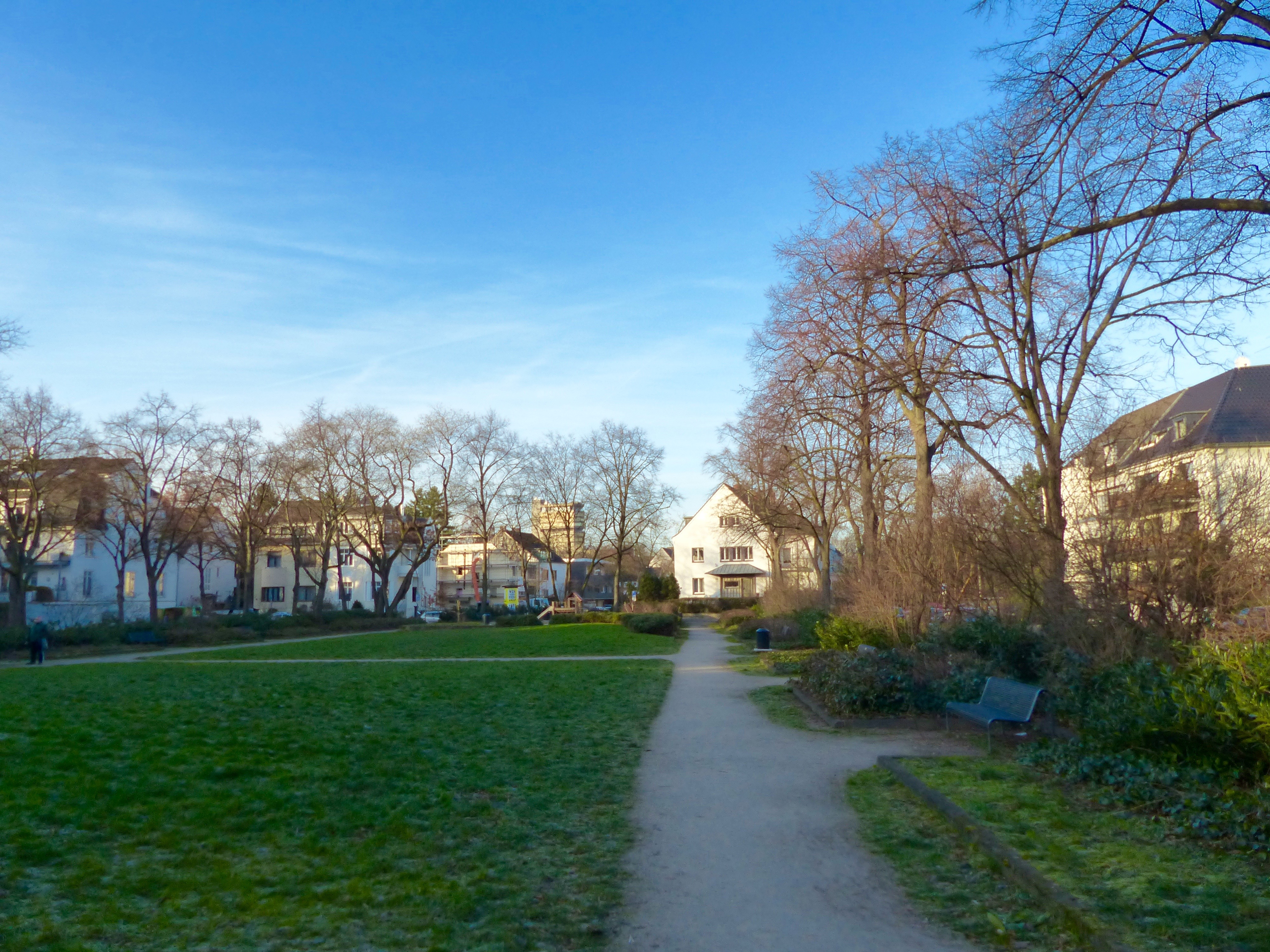 Köln-Lindenthal: Lortzingplatz, Zustand 2016